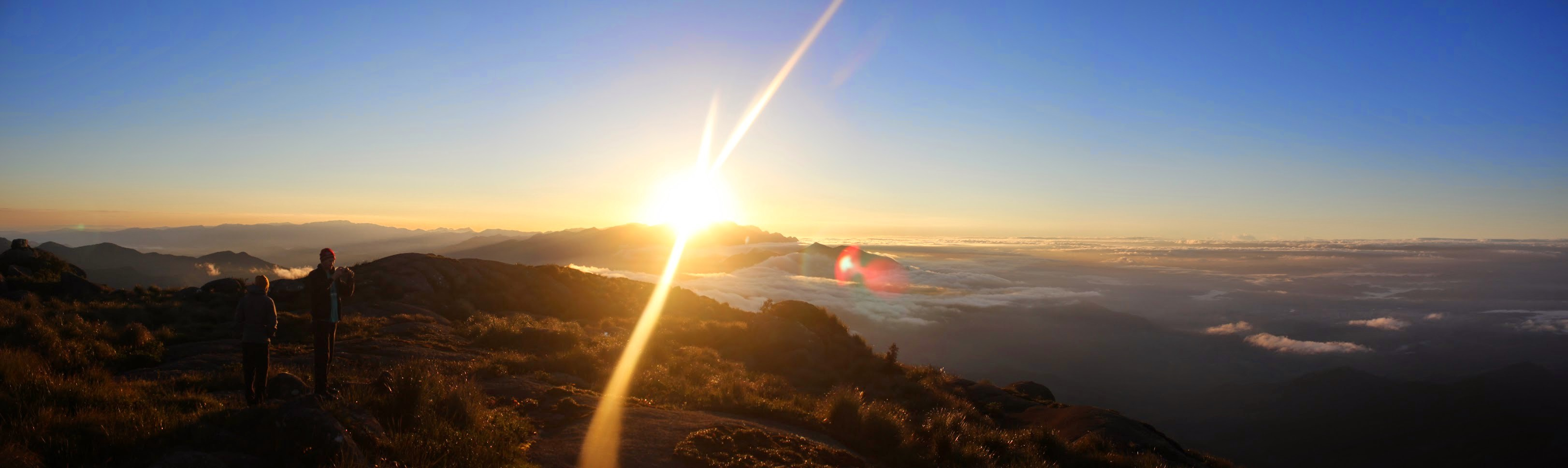 Por do sol no Pico dos Marins com montanhistas ao fundo depois de uma longa jornada